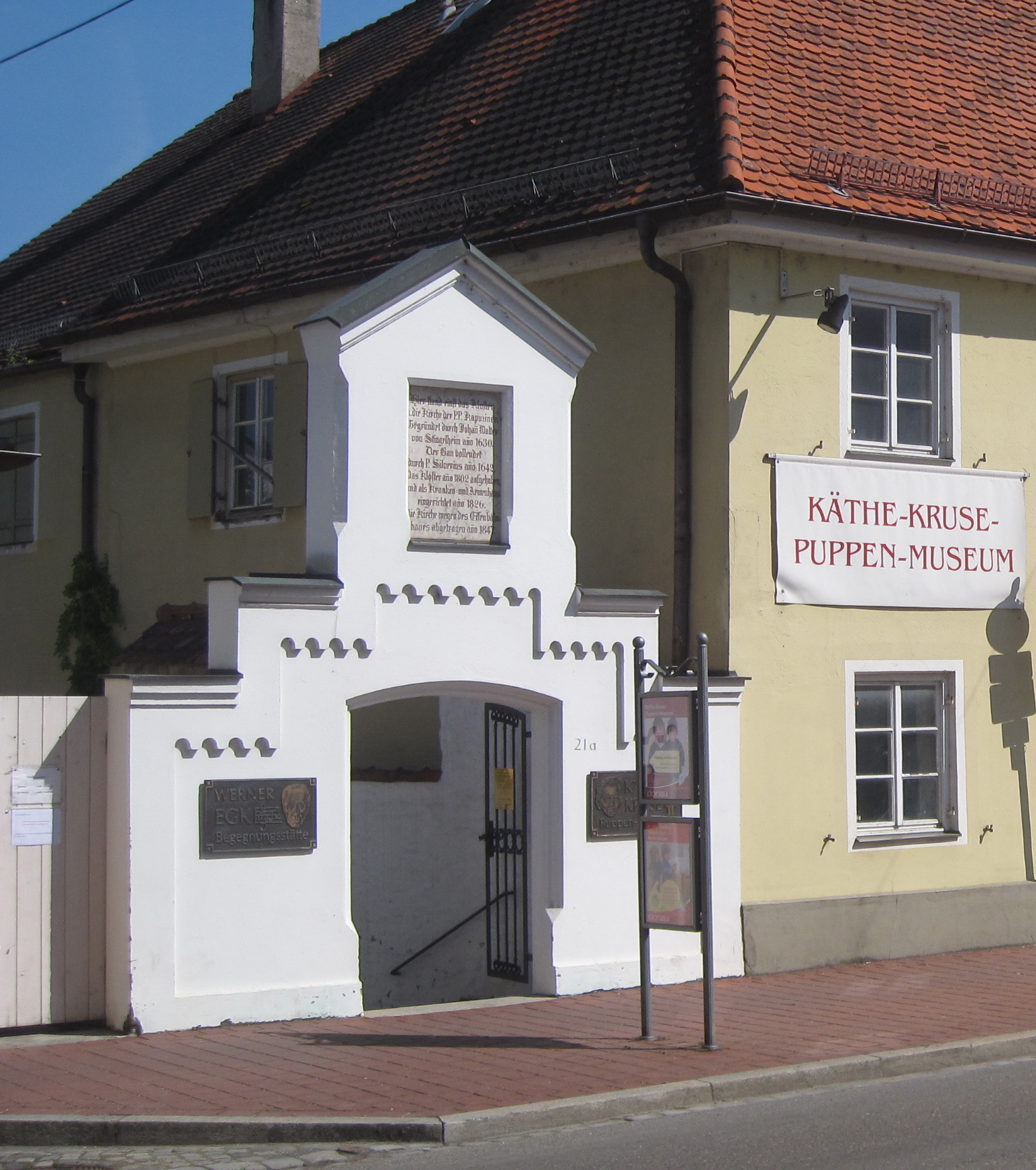 Käthe-Kruse-Puppen-Museum in Donauwörth, Pflegstraße 21 a.